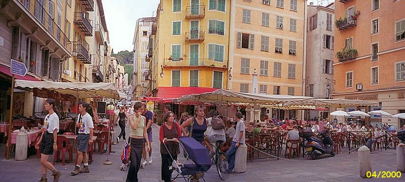 La place Rossetti et la rue Rossetti dans sa vocation actuelle touristique. La cathédrale se situe au dos. (vers l'est et la colline du château).